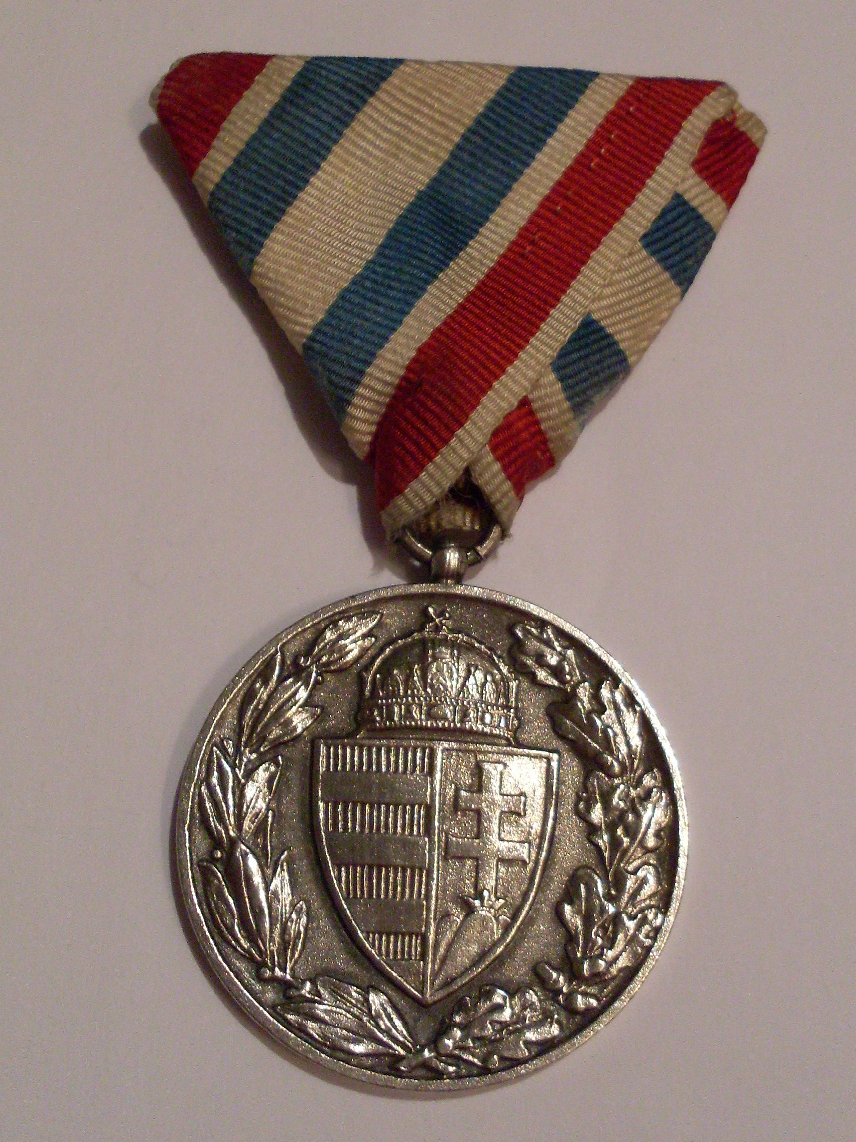 Ungarische Weltkriegserinnerungsmedaille ohne Schwerter